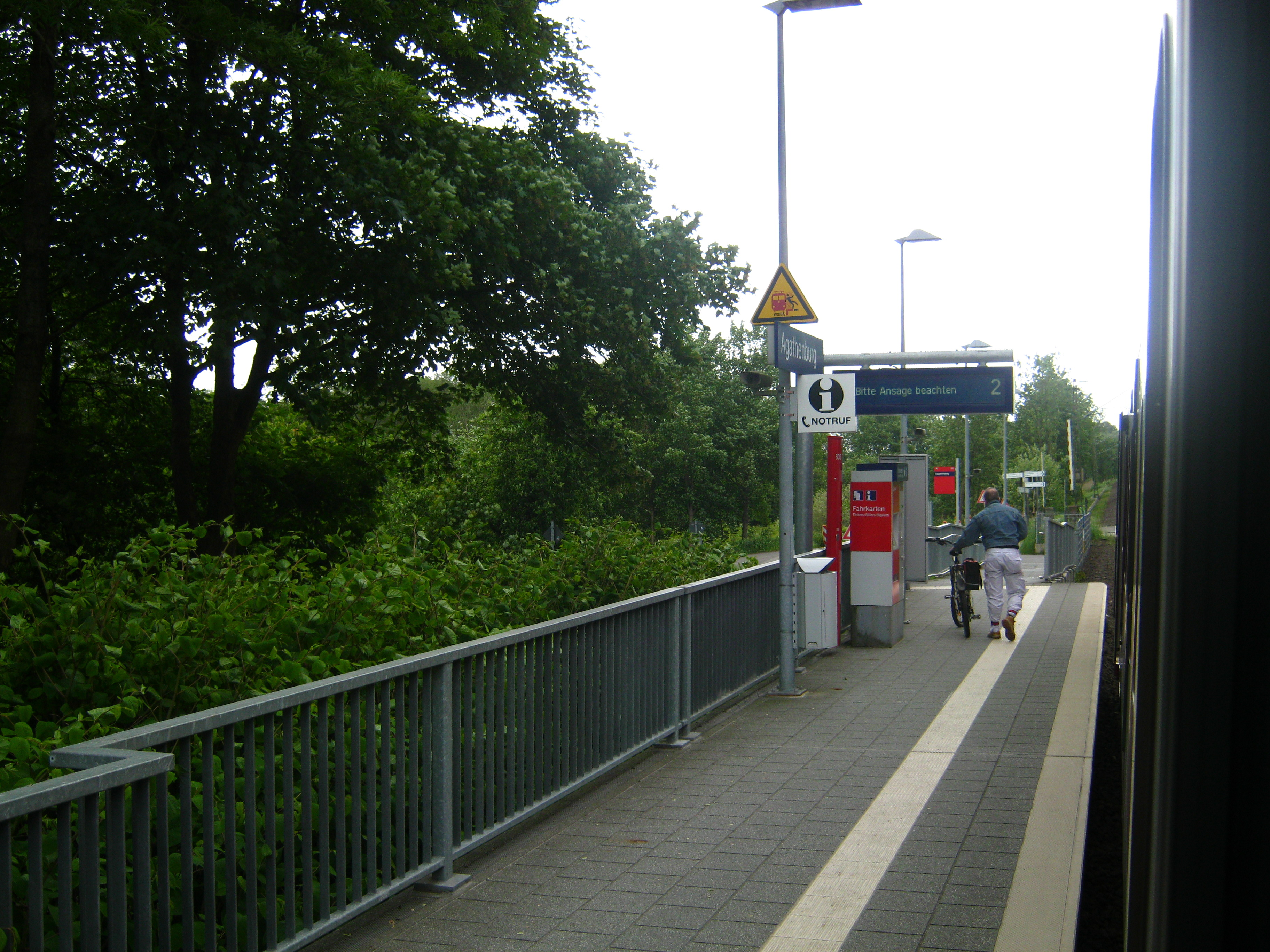 S-Bahn-Station Agathenburg.